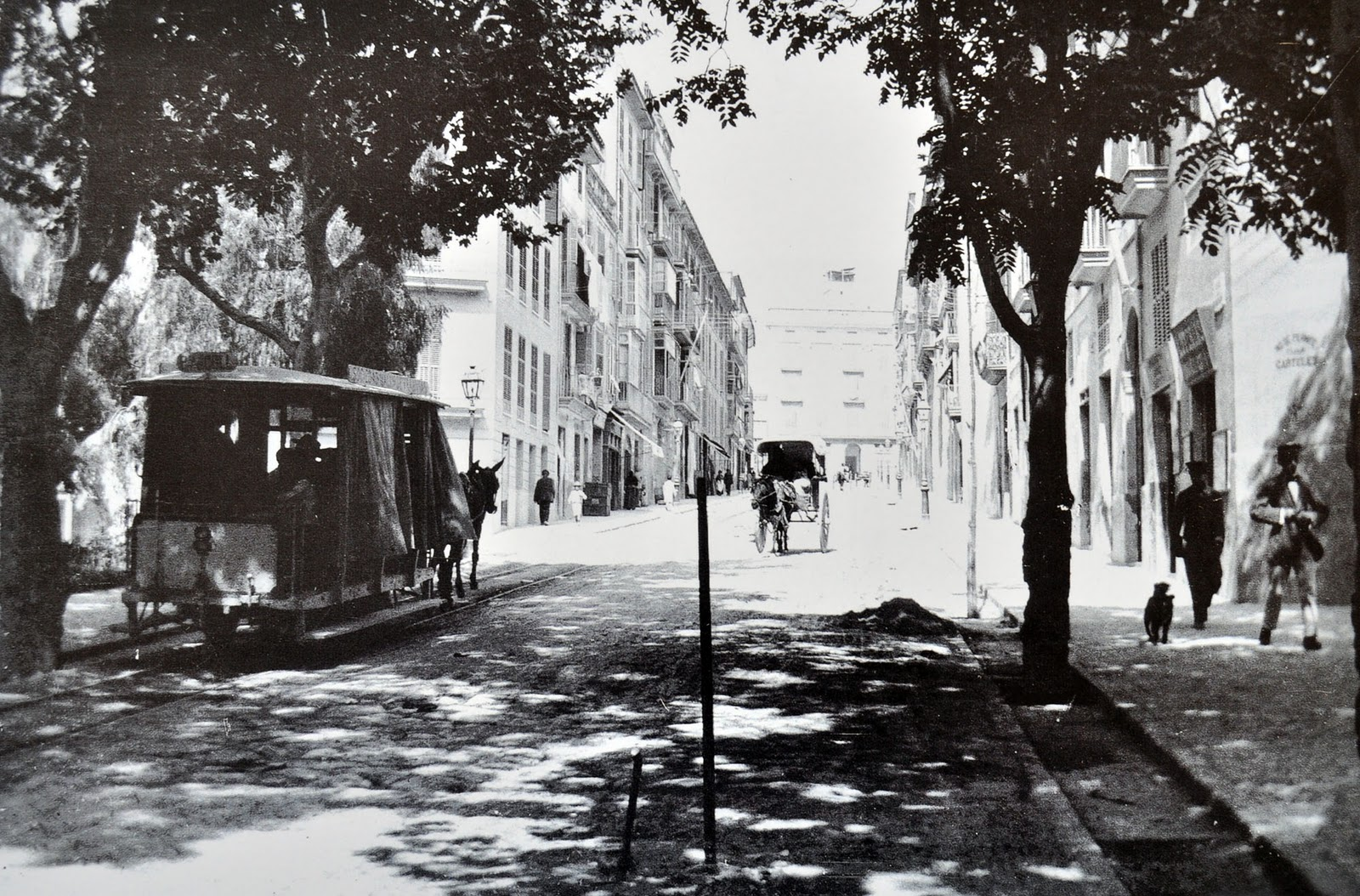 En la Costa del Conquistador,1915. Palma de Mallorca, Spain.